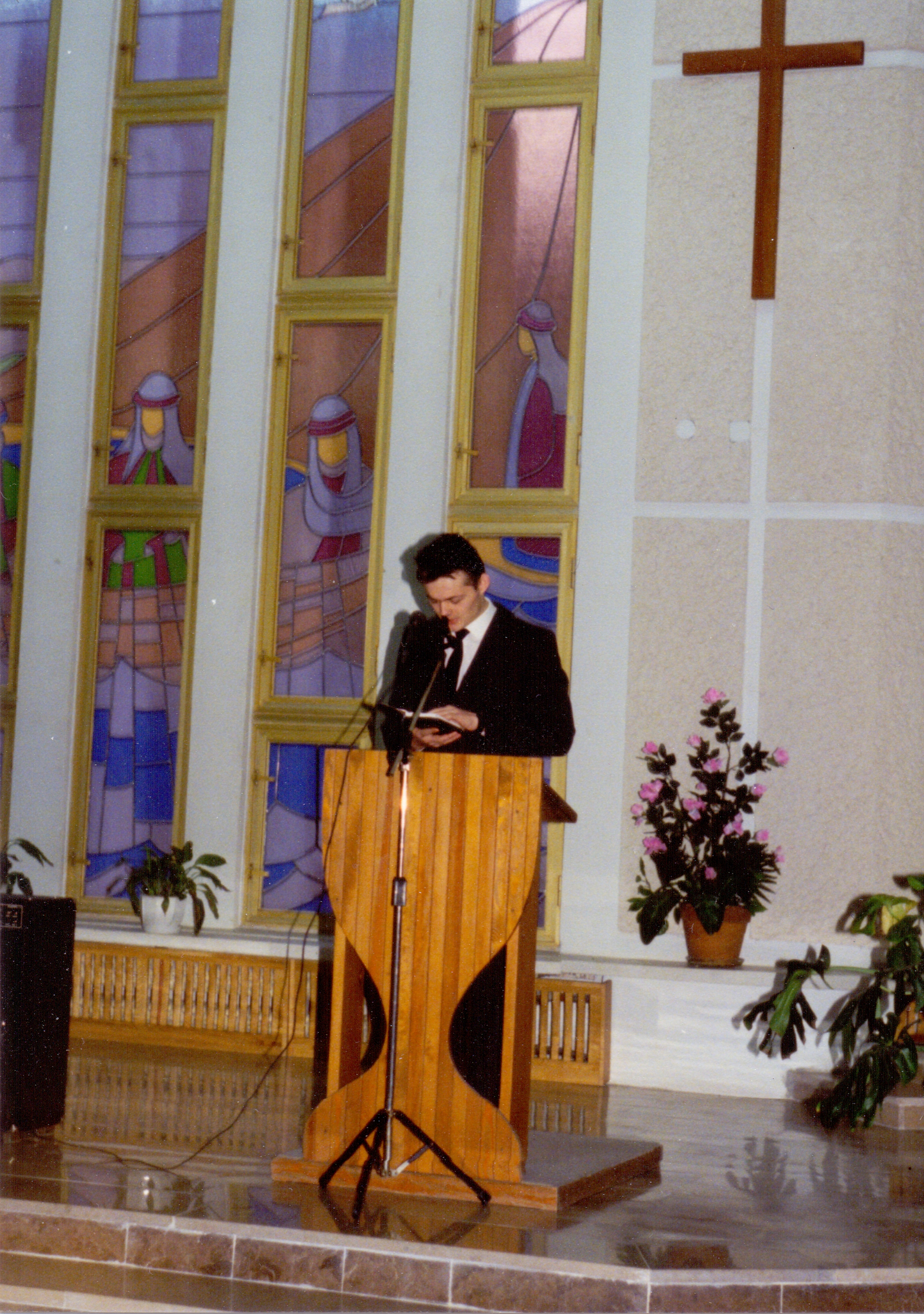 Sienna 68/70 1993